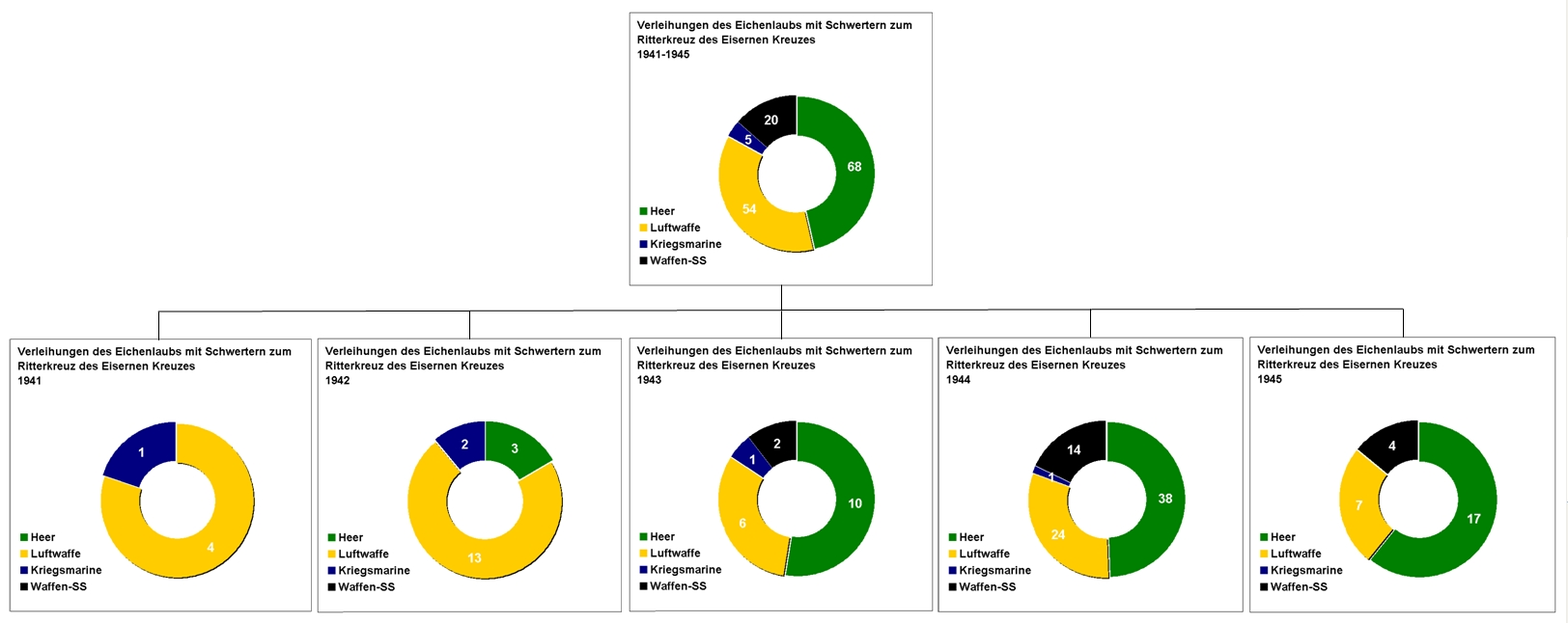 Verleihungszahlen Ritterkreuz des Eisernen Kreuzes mit Eichenlaub und Schwertern